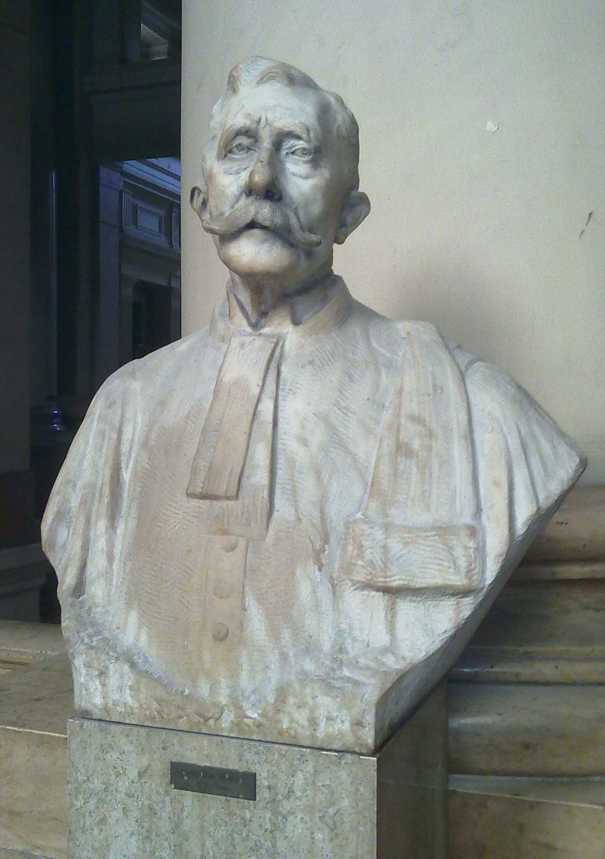 Buste d'Alexandre Braun °1847 +1925 Avocat, Sénateur et poête. photo prise sur le péristyle du palais de Justice de Bruxelles en 2010.